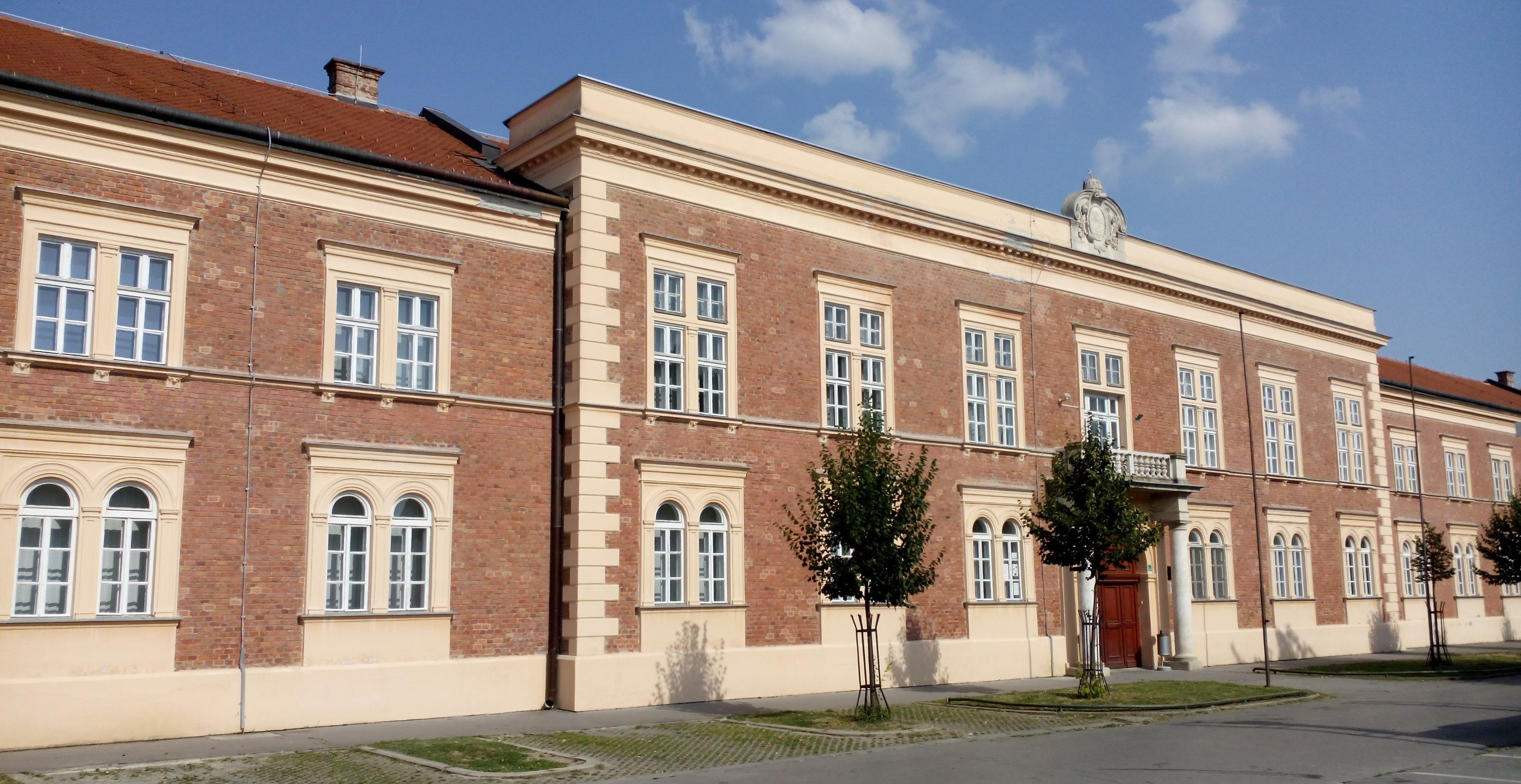 Zgrada Odjela za fiziku i Odjela za matematiku na Gajevom trgu u Osijeku.